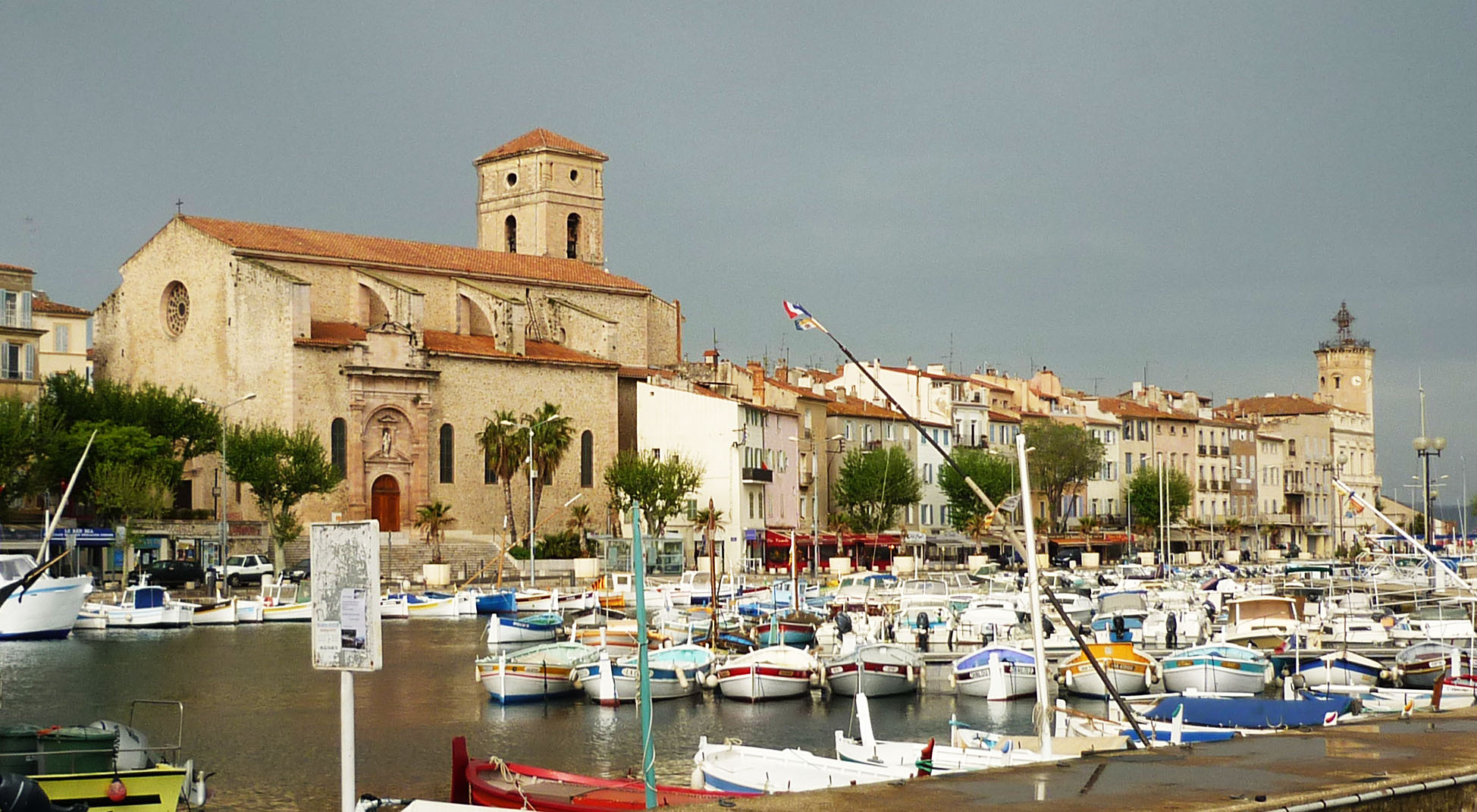 Hafen von La Ciotat mit Pfarrkirche Notre-Dame-de-la-Garde und Uhrturm